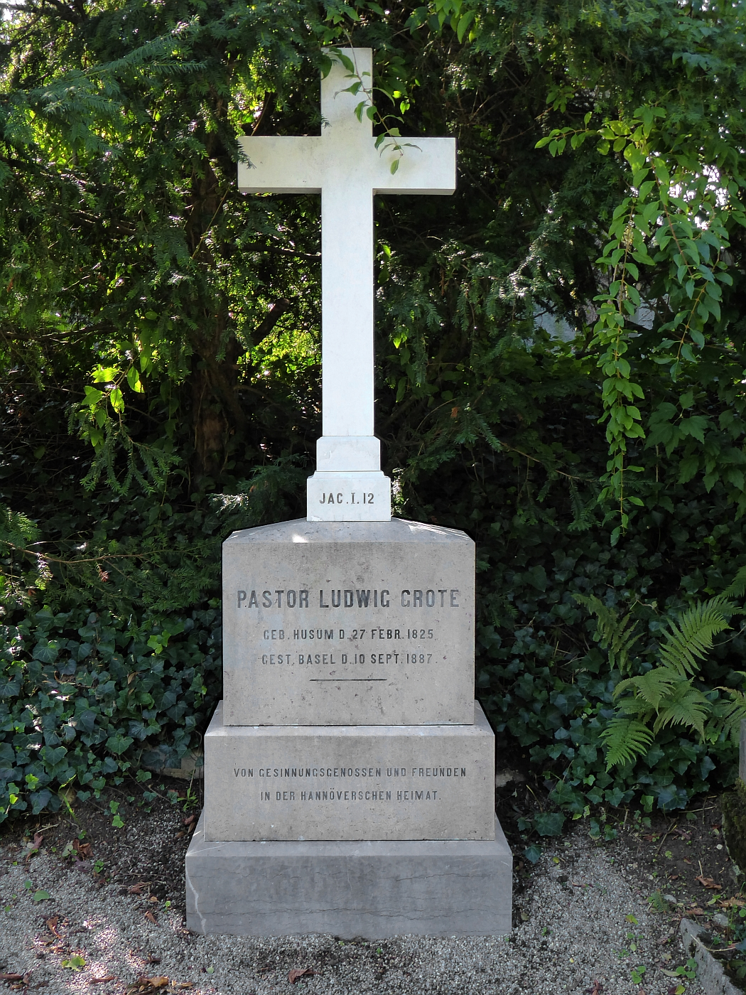 Ludwig Heinrich Grote (1825–1887) Theologe, Publizist, Grab auf dem Friedhof Wolfgottesacker, Basel